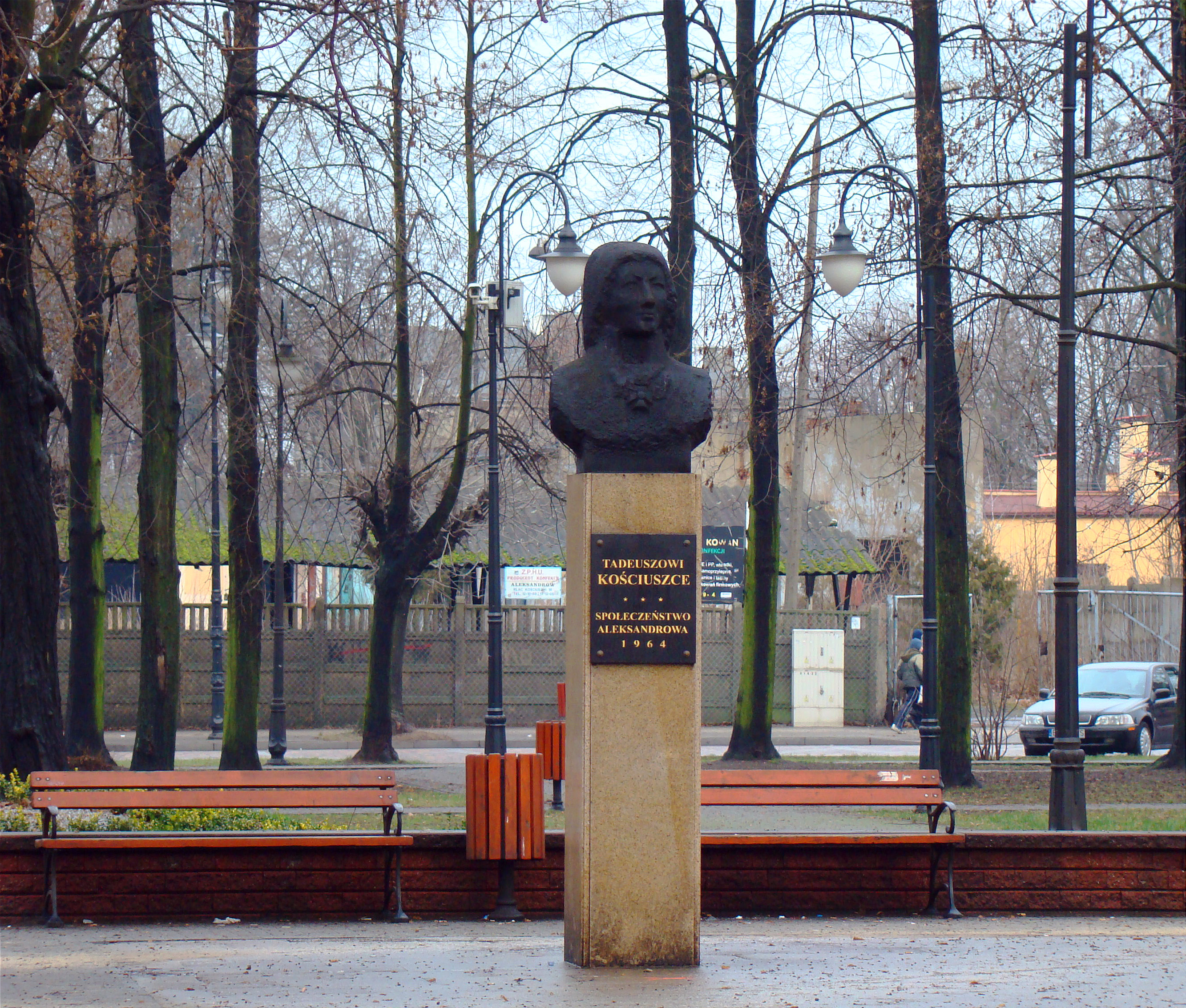 Pomnik Tadeusza Kościuszki w Aleksandrowie Łódzkim (powiat zgierski, województwo łódzkie), Polska